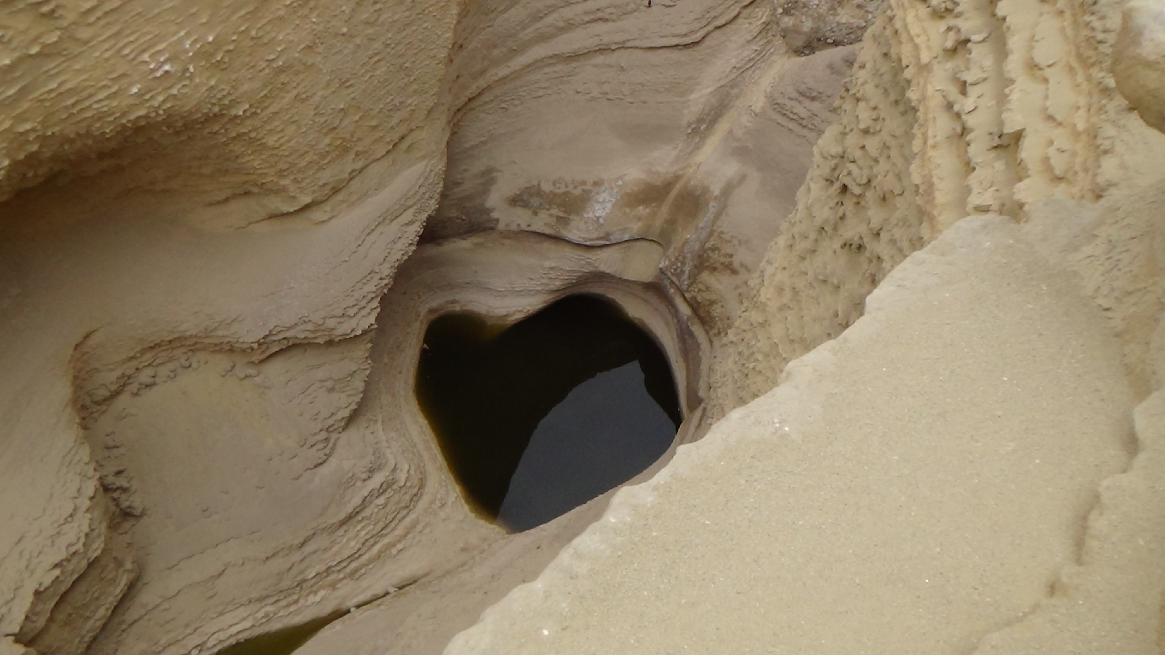 El "Ojo de agua" en el gran "Cañón de los Perdidos"